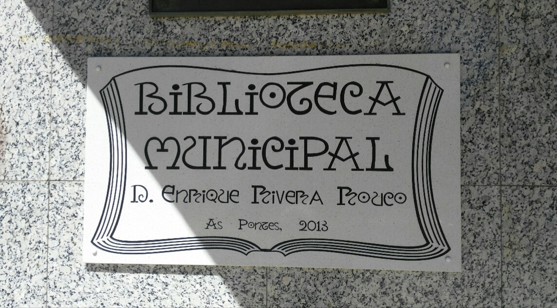 Placa da biblioteca municipal de As Pontes